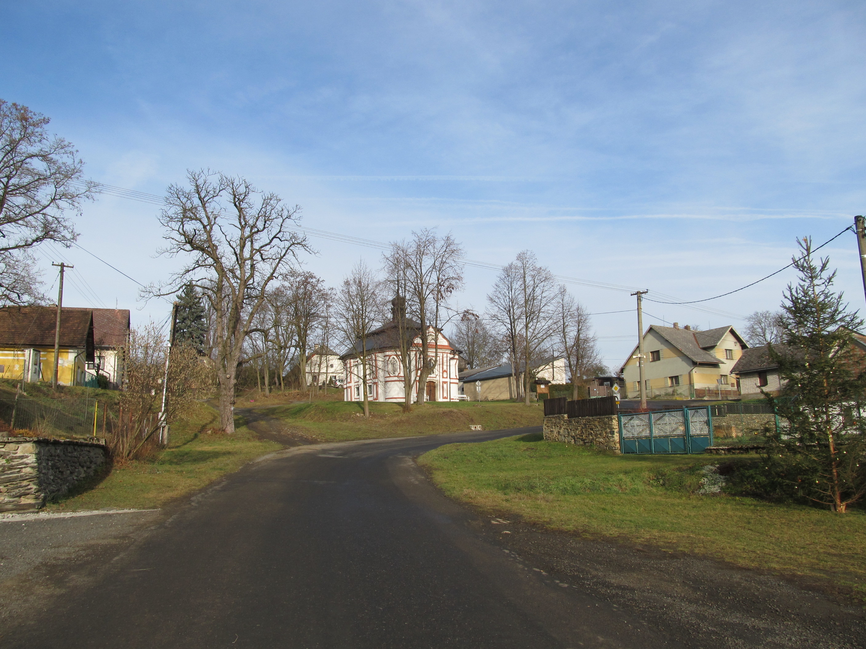 Miletice - náves s kaplí sv. Jana Nepomuckého